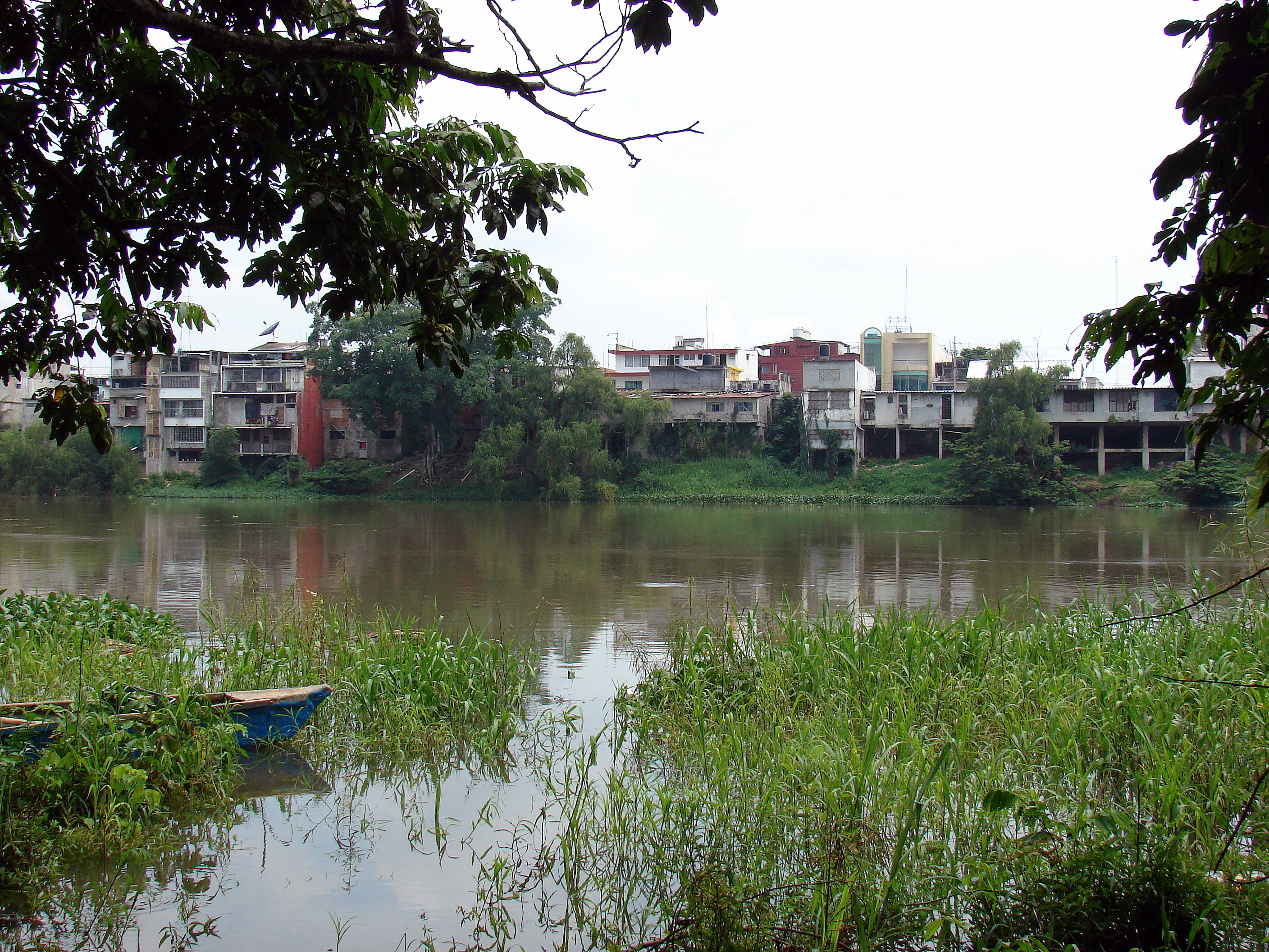 Imagen tomada desde el puente Tuxtepec de la vista la ciudad de Tuxtepec